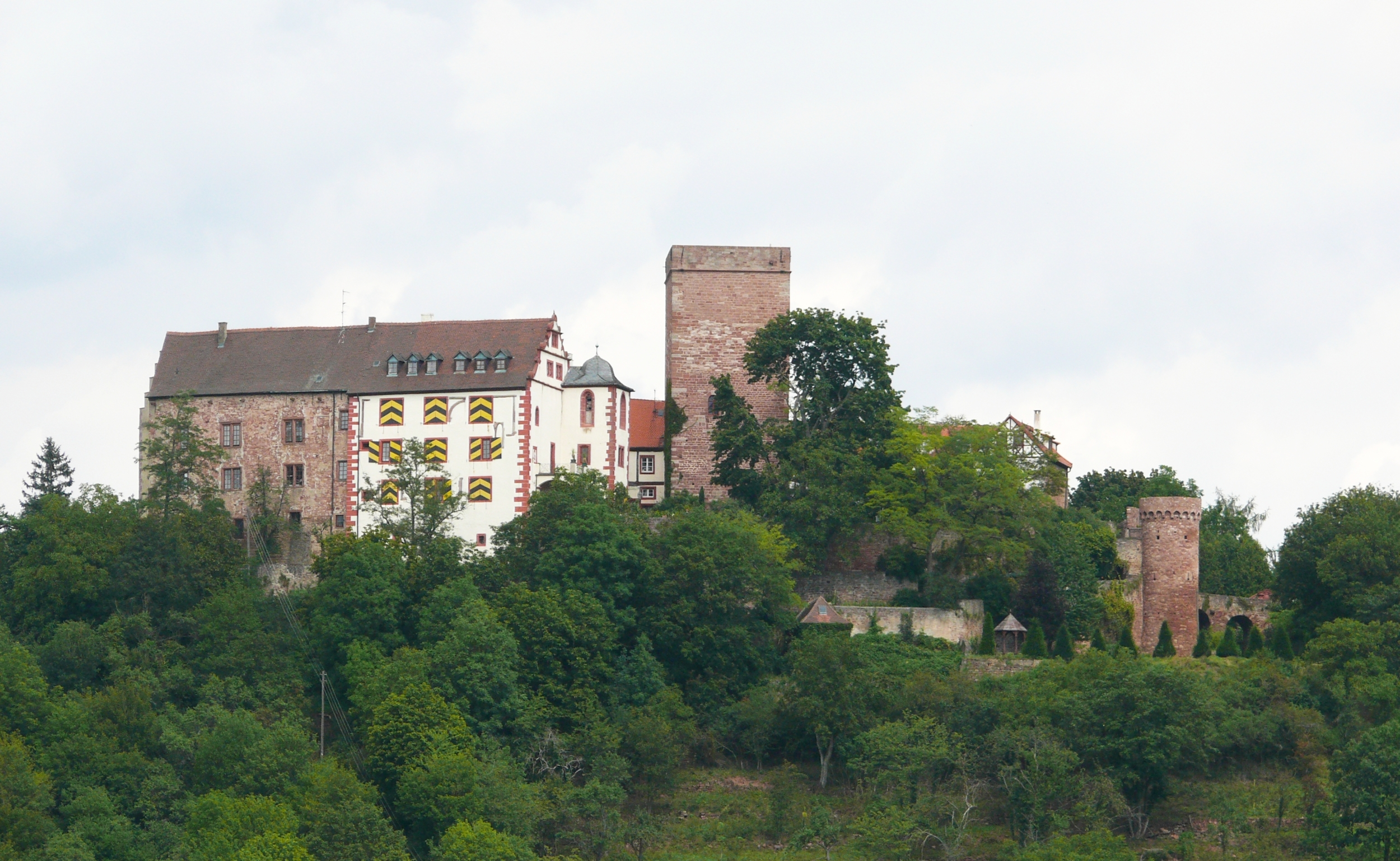 Burg Gamburg in Gamburg bei Werbach, Main-Tauber-Kreis, Germany/Deutschland